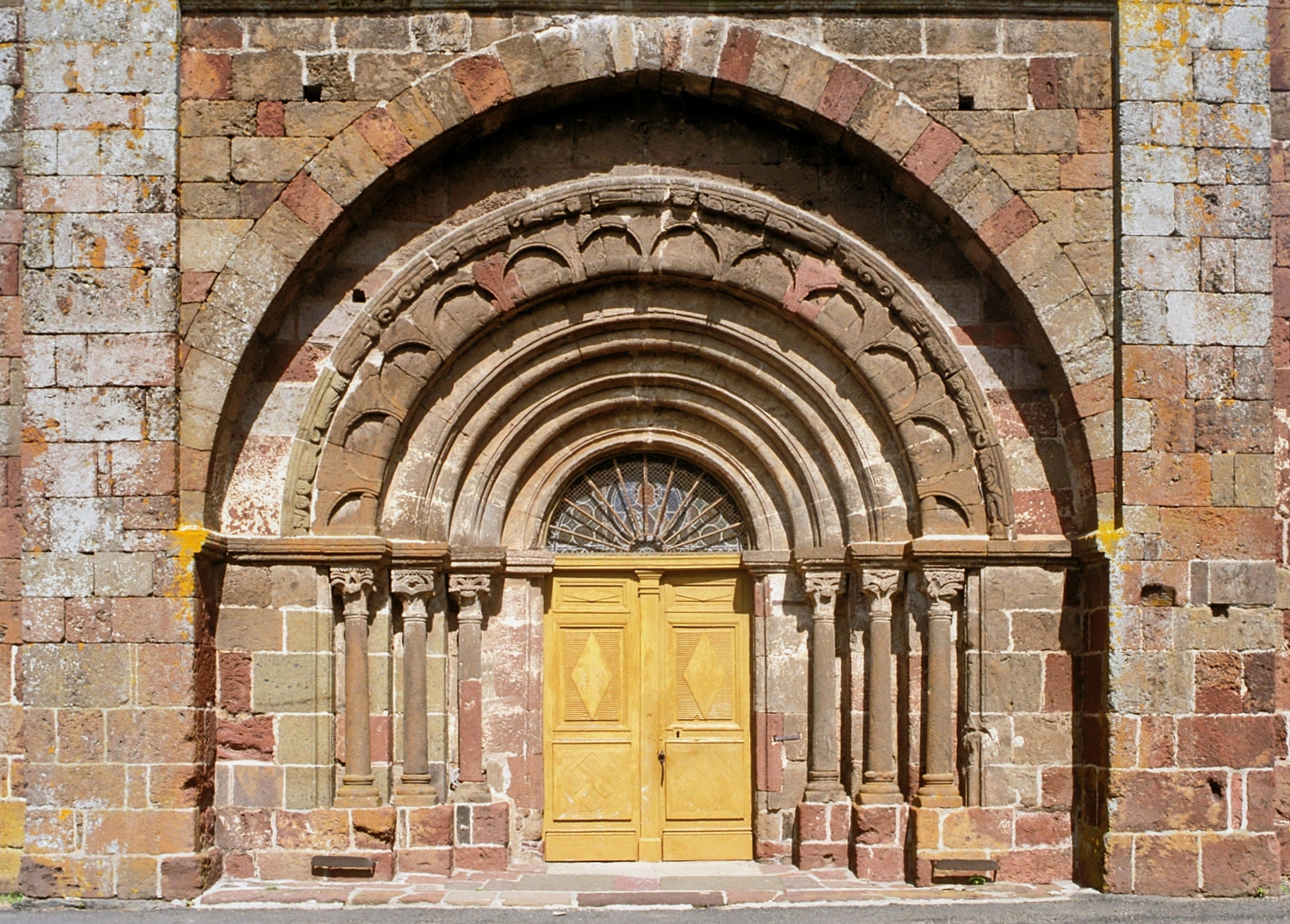 Bains - portail polylobé (Auvergne; Velay)